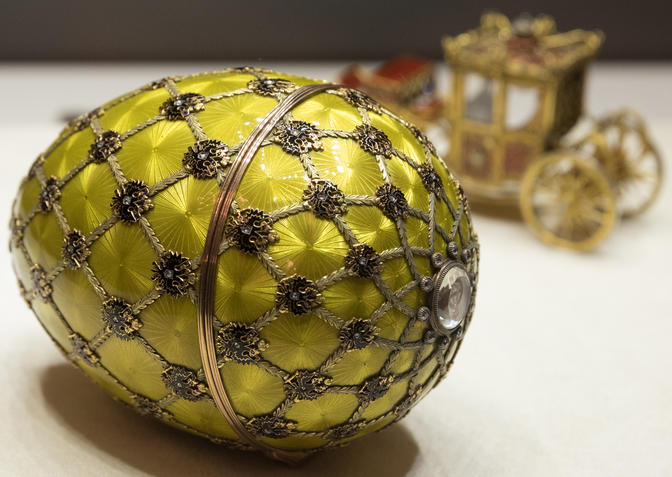 Fabergé Museum, Saint Petersburg, Russia